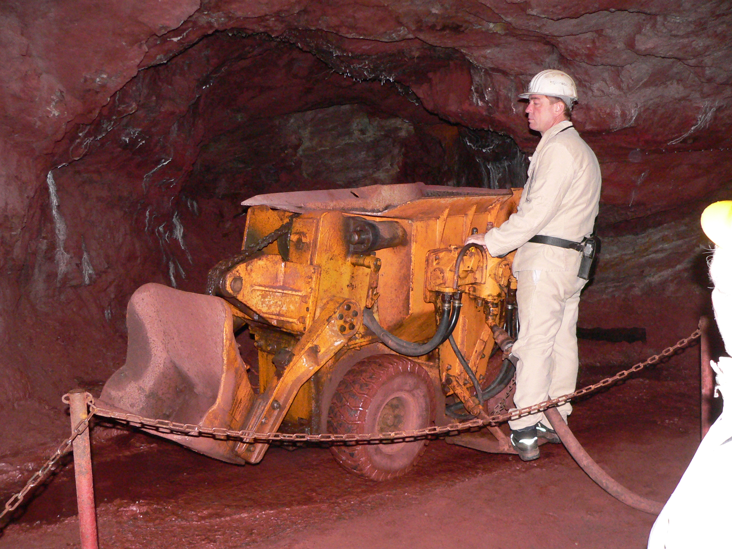 Bunkerlader, luftbereift